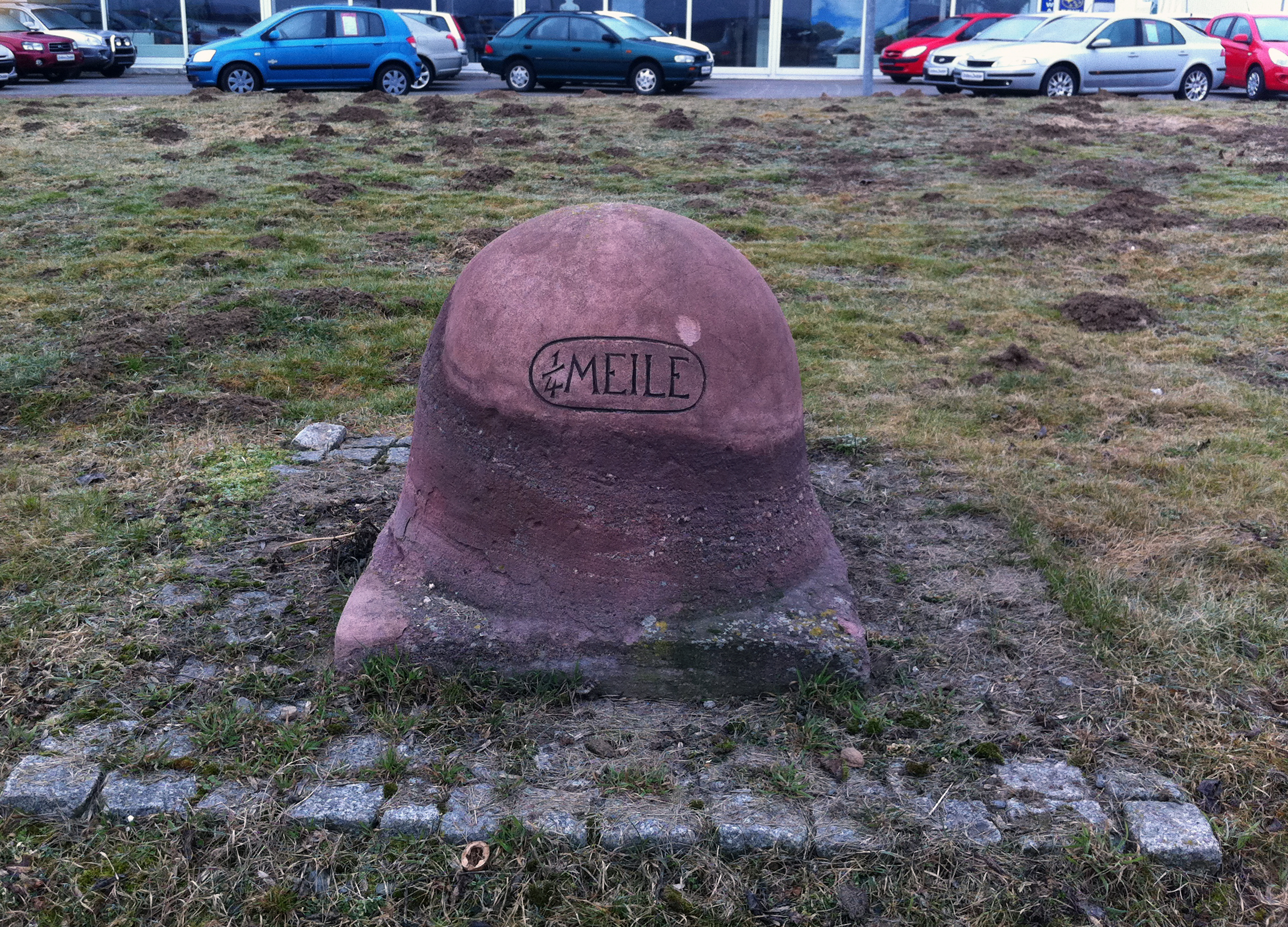 Preußischer Viertelmeilenstein von 1826 an der Bundesstraße 80 in Eisleben, Ortsteil Helfta. Früher verlief hier die Kunststraße von Langenbogen über Eisleben und Sangerhausen nach Nordhausen.